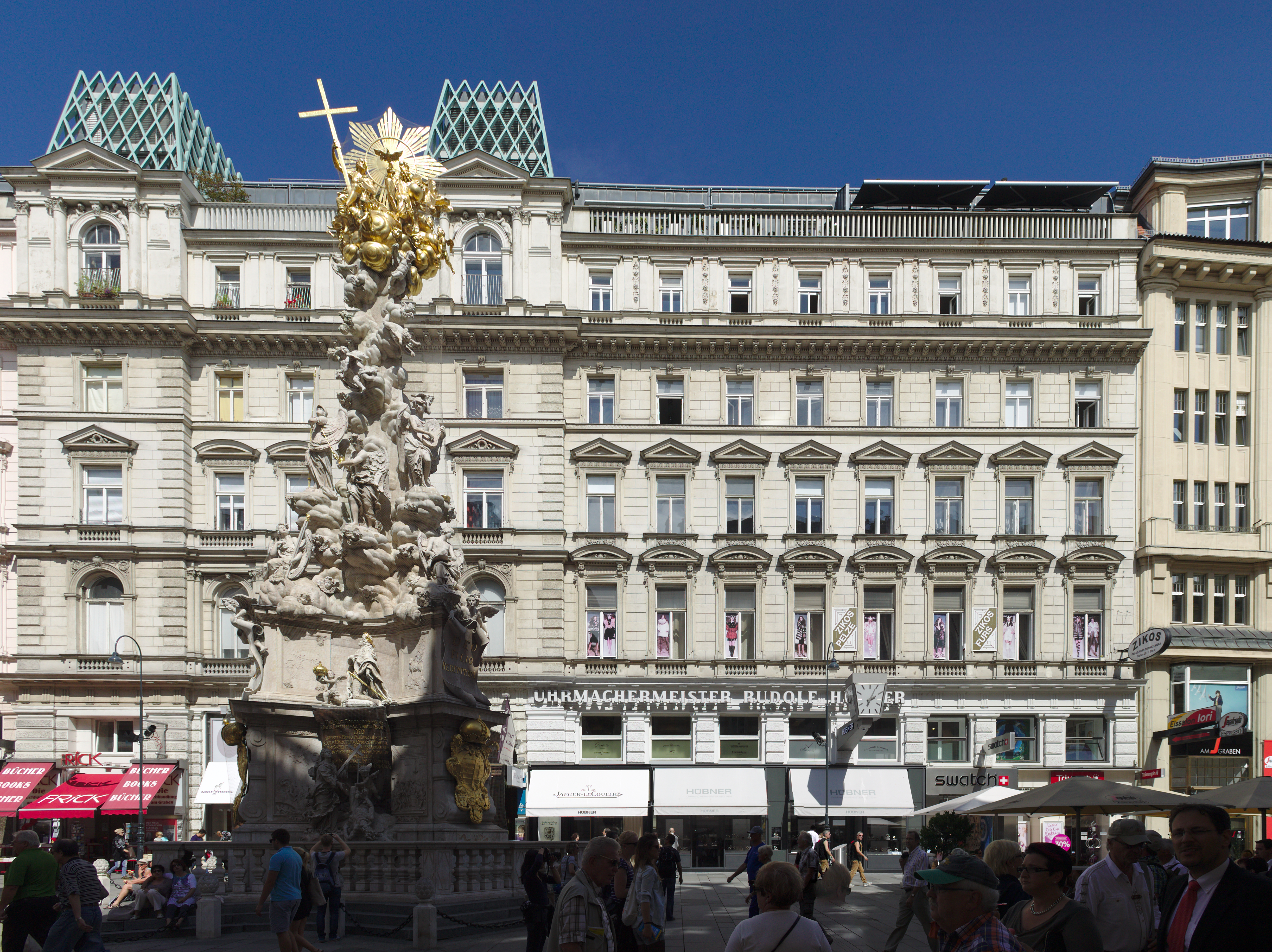 Wohn- und Geschäftshaus, Graben 26-28, Wien